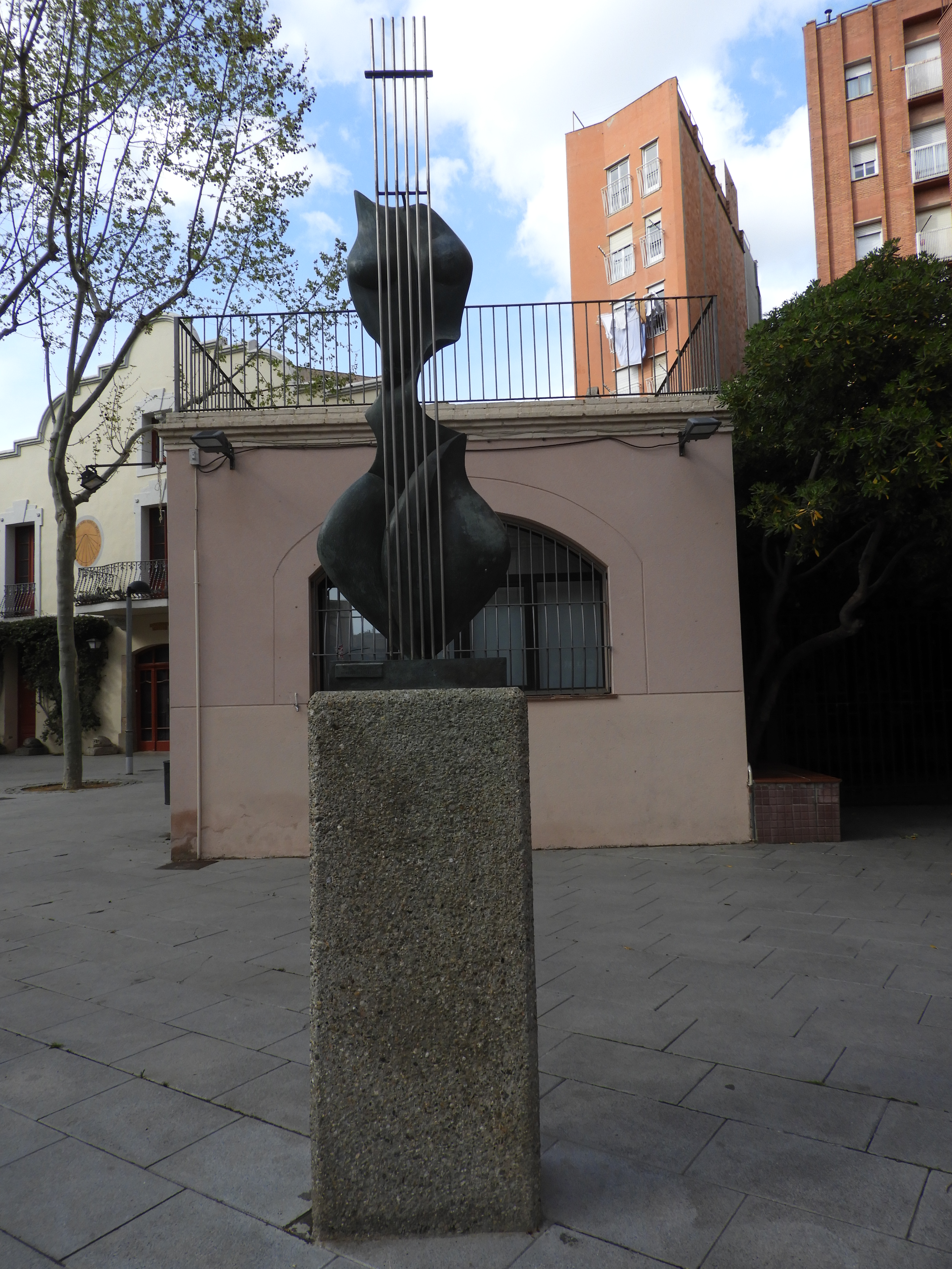 Escultura als Jardins del Casal de Cultura Robert Brillas, Esplugues de Llobregat (Barcelona, Catalonia)